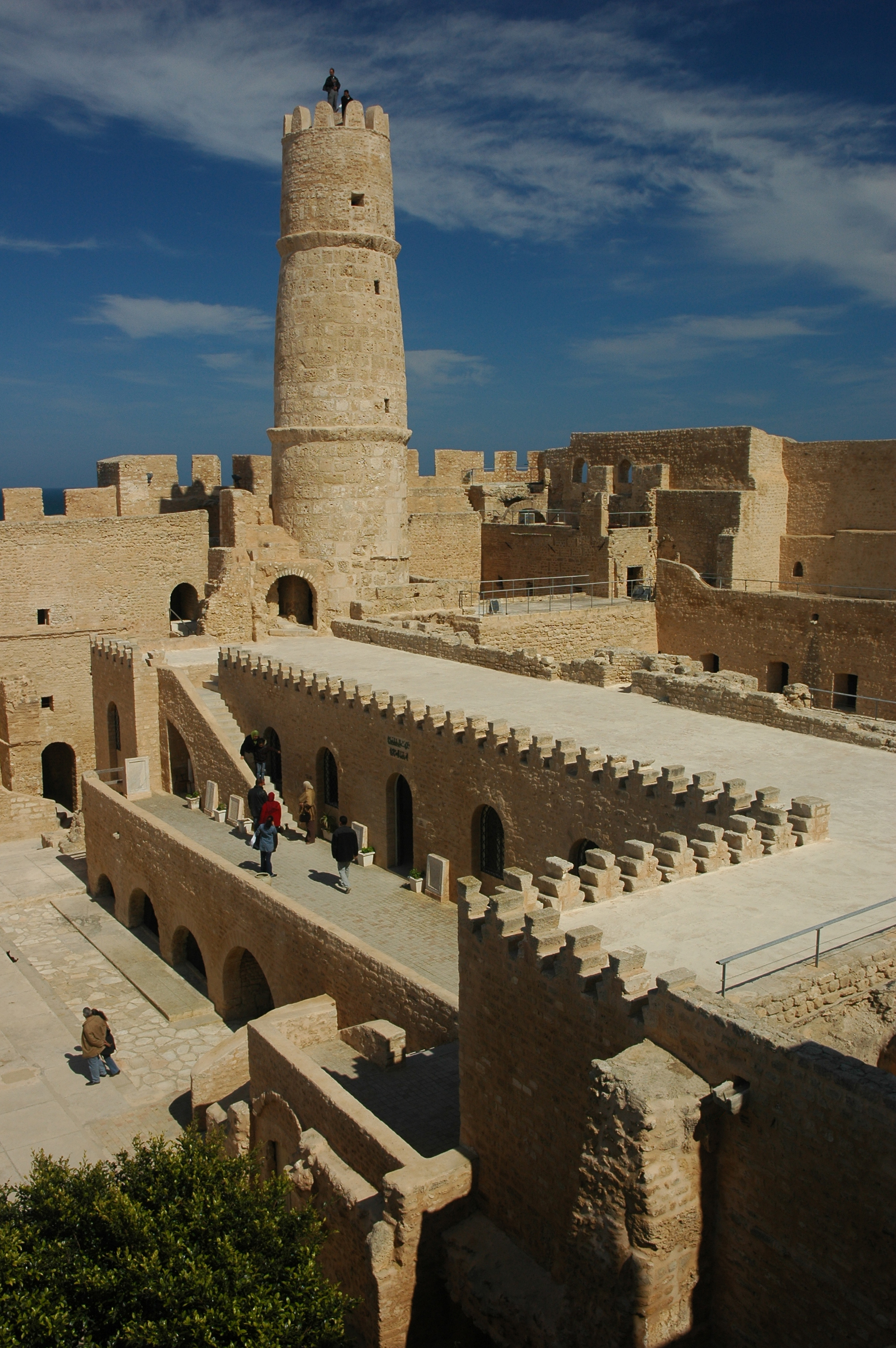 Ribat de Monastir en Tunisie